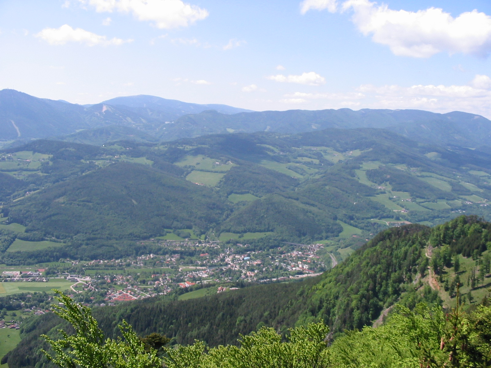 Blick auf das Schwarzatal (hier Payerbach), Österreich von der Schöberlwarte aus